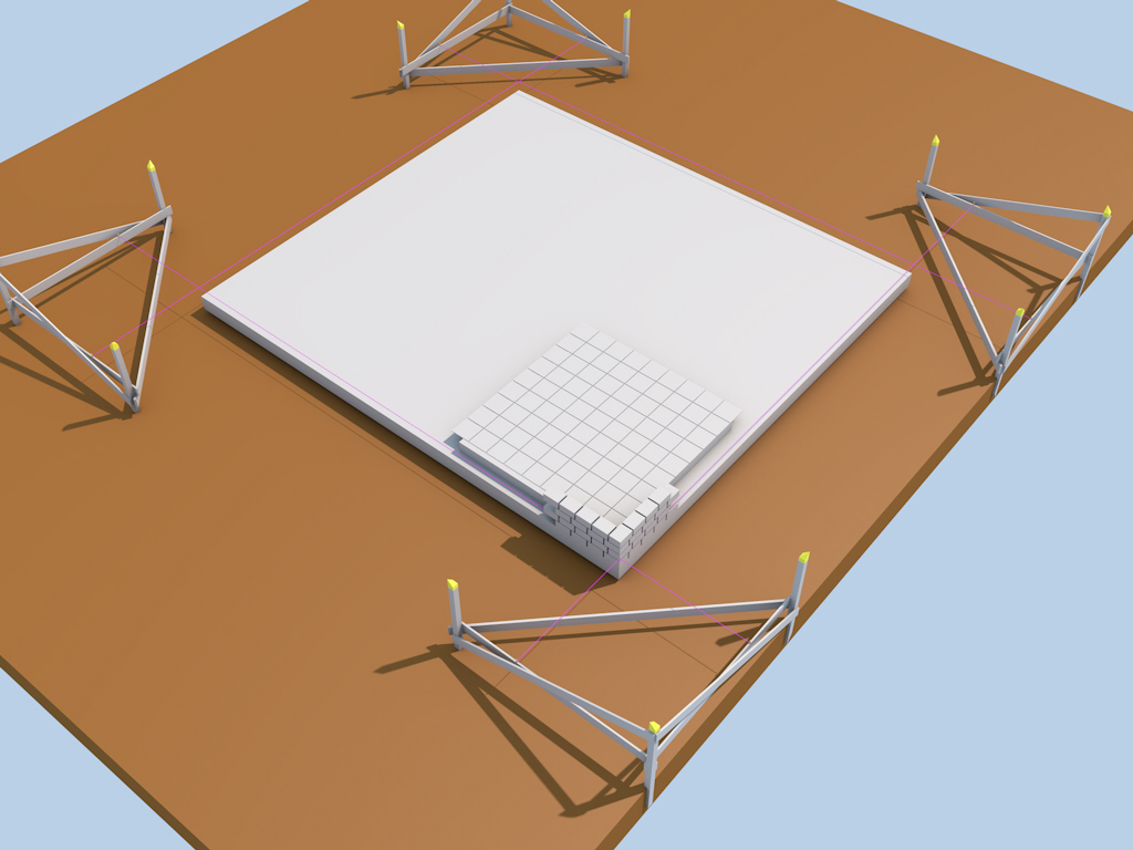 Schnürgerüst CAD